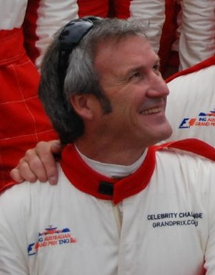 Australian skier Steve Lee